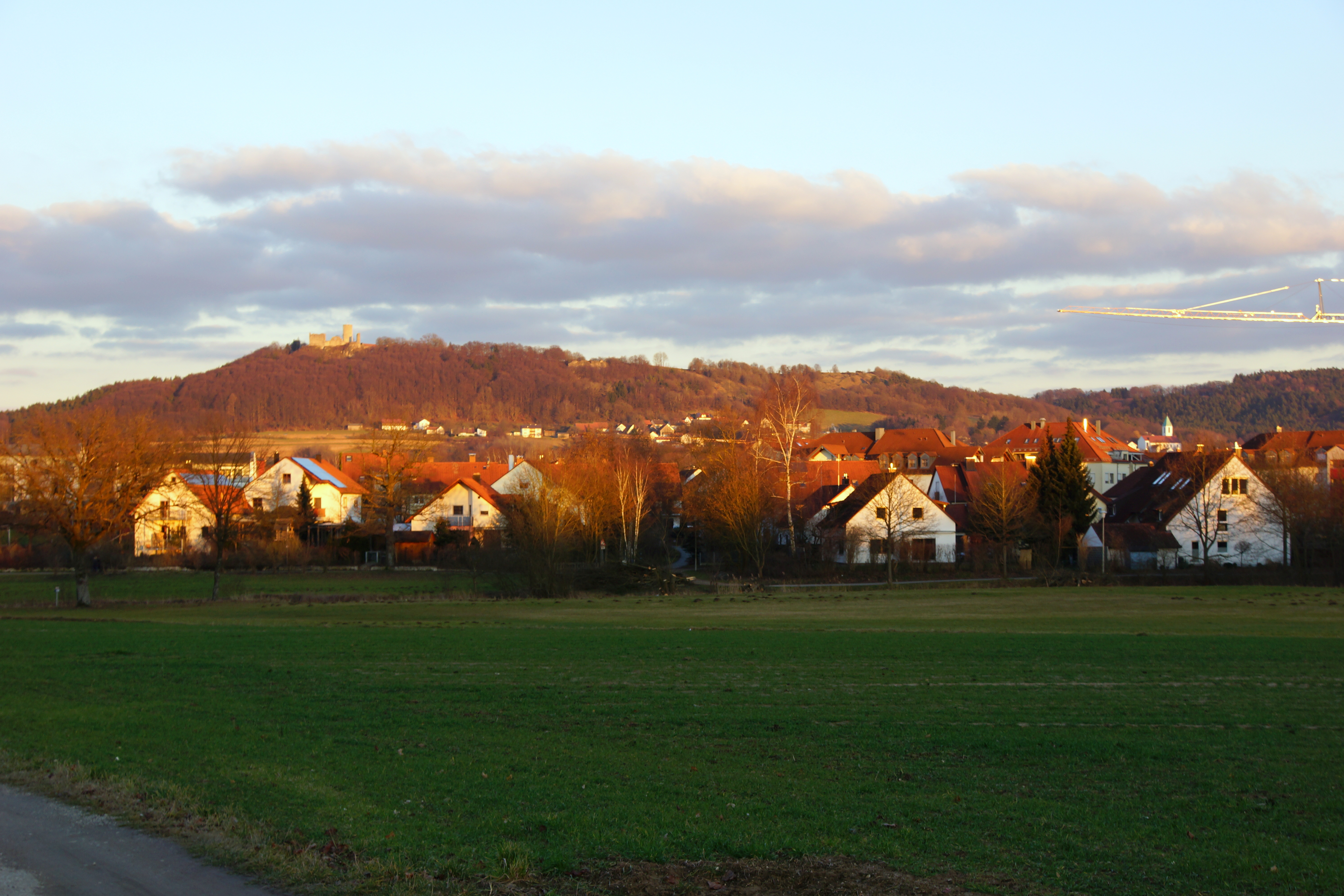 Blick auf den Neumarkter Stadtteil Altenhof von der Altdorfer Straße, im Hintergrund der Wolfstein